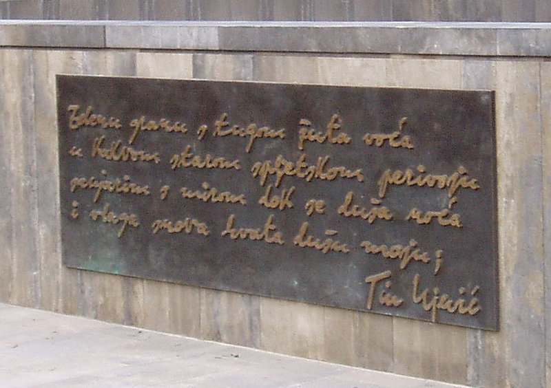 Tin Ujević